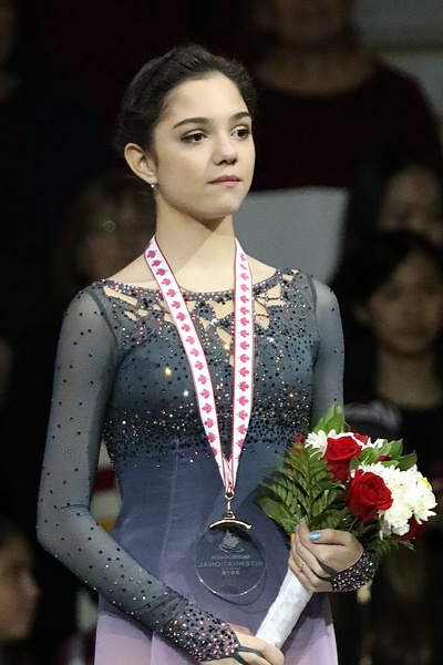 Евгения Медведева на церемонии награждения Skate Canada International 2016